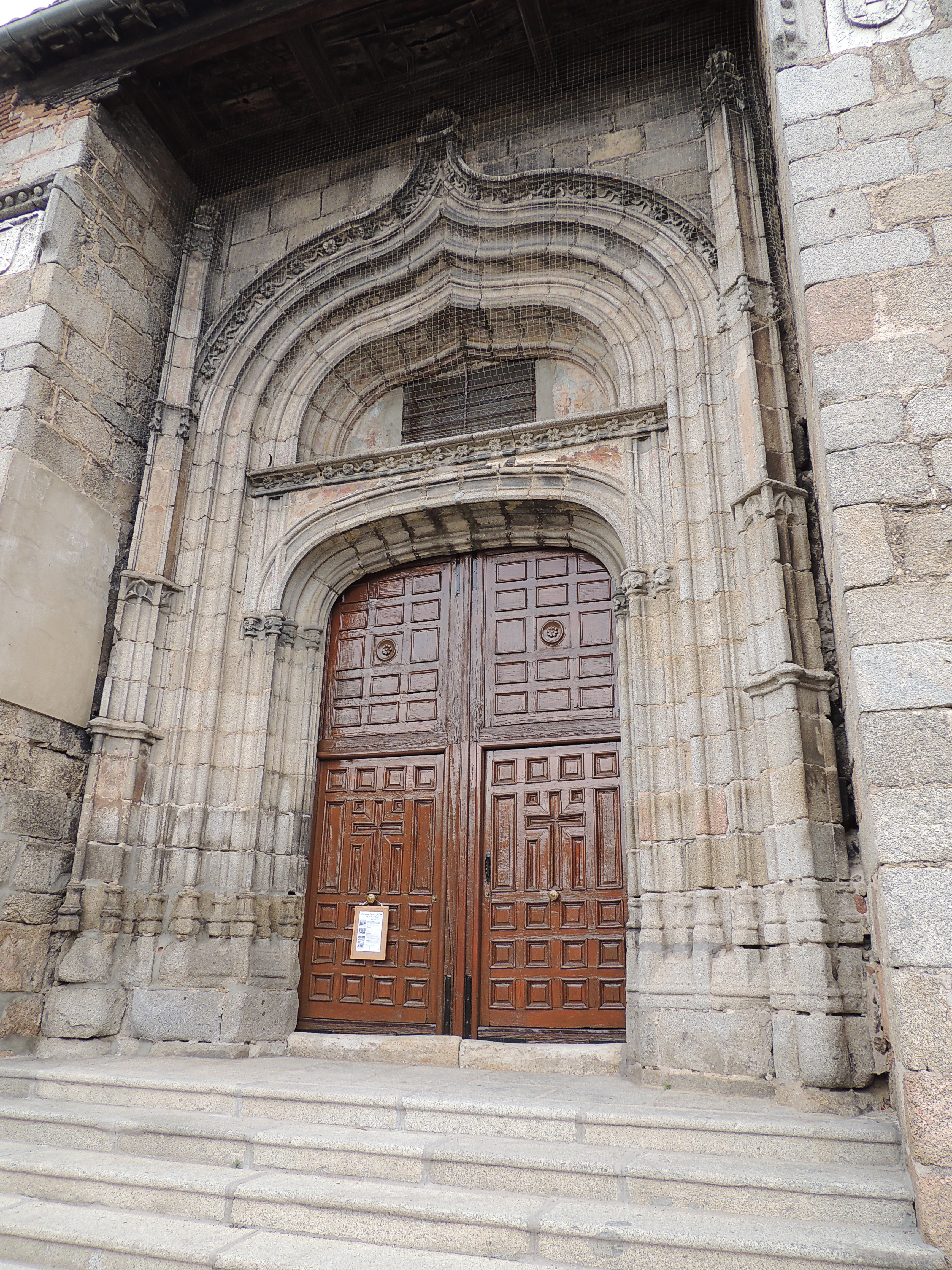 Portada de la iglesia de Mombeltrán